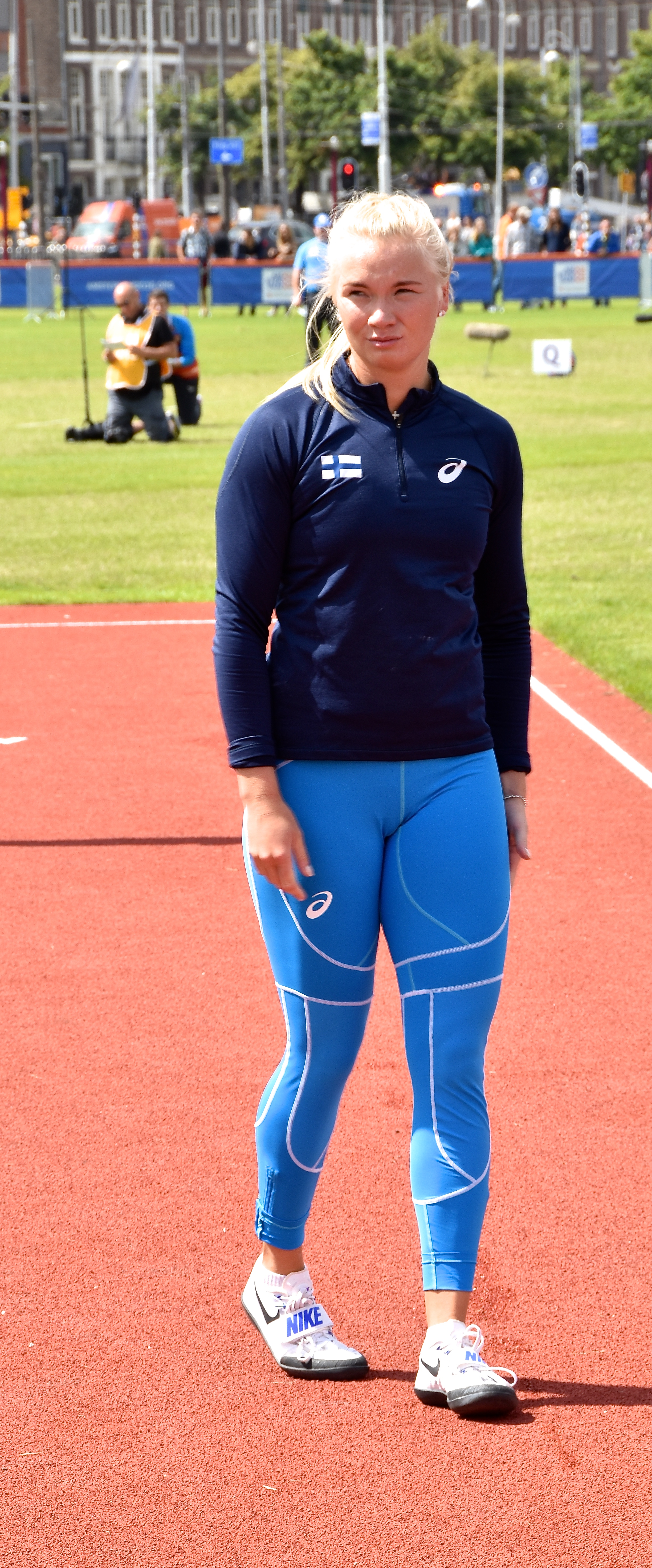 De Finse Salla Sipponen (Maaliskuuta 1995) tijdens de voorronde van het Europees Kampioenschap discuswerpen op het Museumplein Amsterdam. Ze moest minimaal 58m gooien om de finale te halen. Dat lukte niet. Na 3x werpen, was het einde oefening.